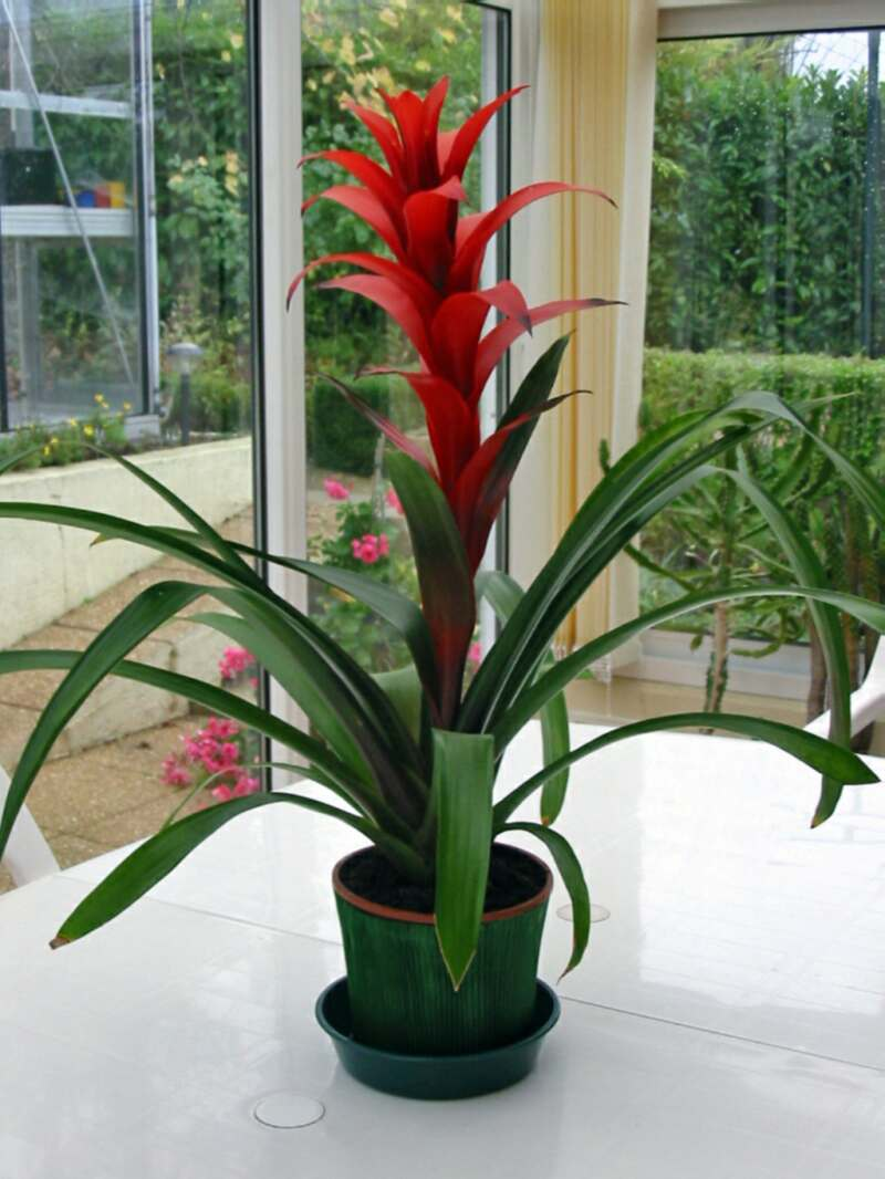 Plante d'appartement01